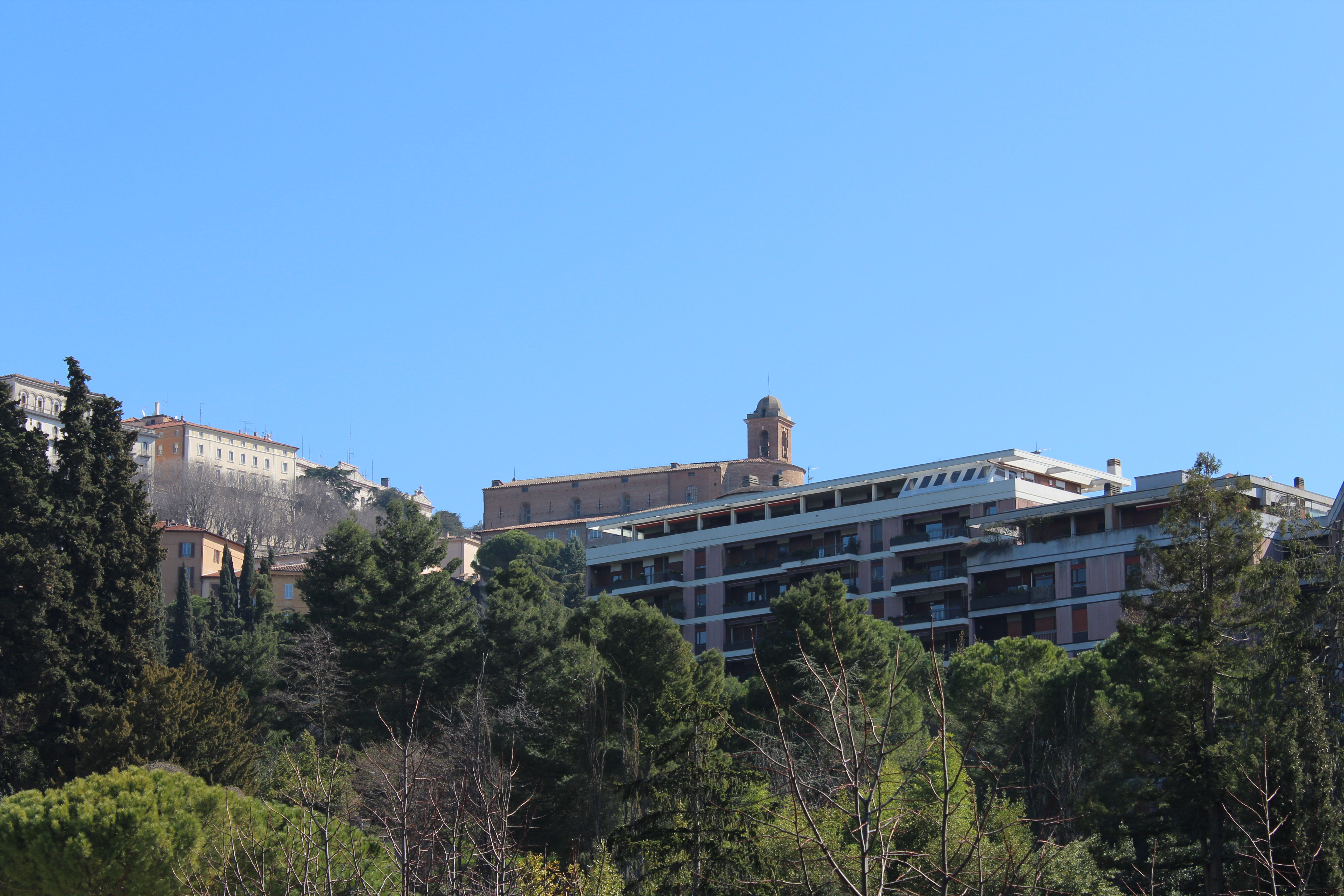 Chiesa di Santo Spirito in Porta Eburnea vista dal Broletto (Fontivegge)